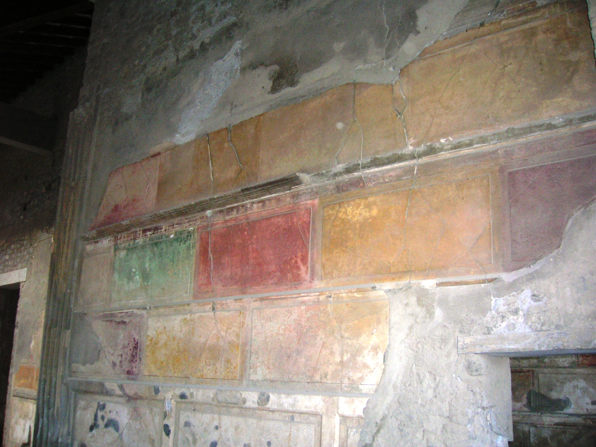 Affresco della Casa di Sallustio